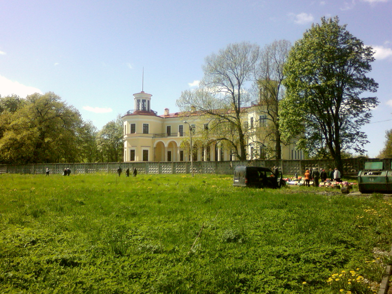 Вид восстановленного дворца Ю.П.Самойловой в пос. Динамо, июнь 2017 г.